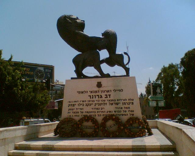 אנדרטה לזכרם של עולה הגרדום דב גרונר ושלושה לוחמי אצ"ל שנפלו במתקפה על תחנת המשטרה הבריטית ברמת גן. צילם דוד שי.